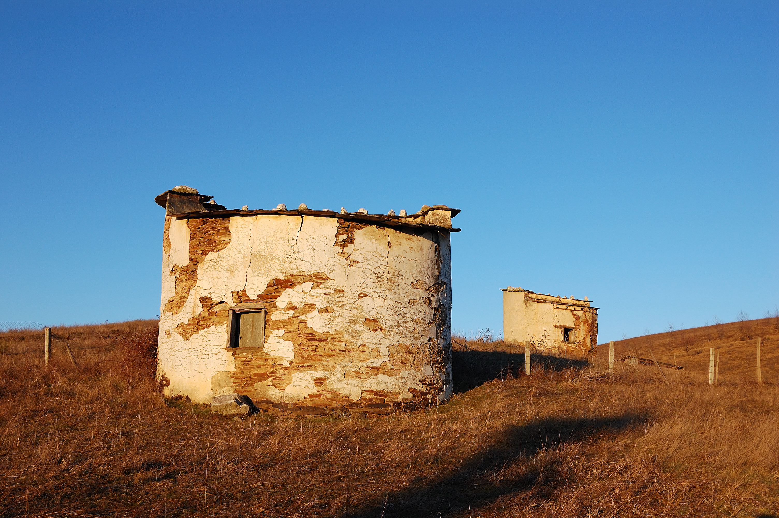 Gimonde, Portugal [2009]